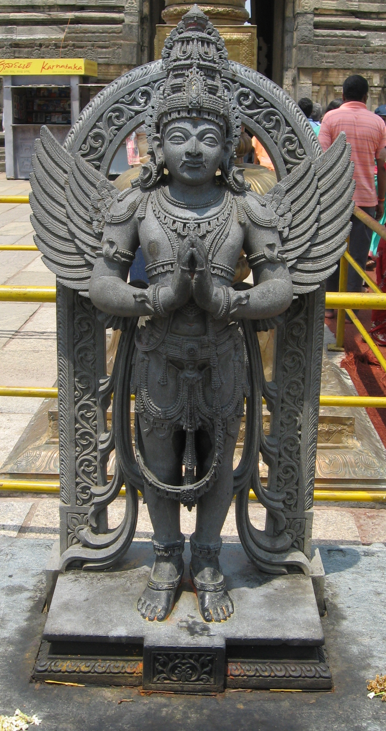 GFDL